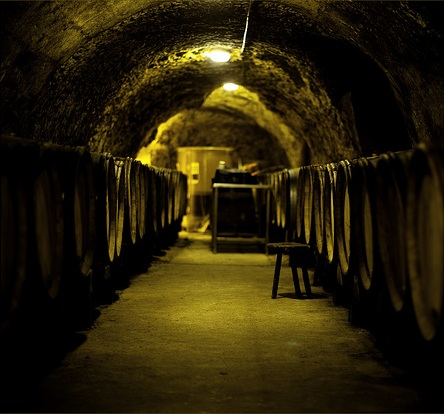 Cave de Jasnières, Loire, France